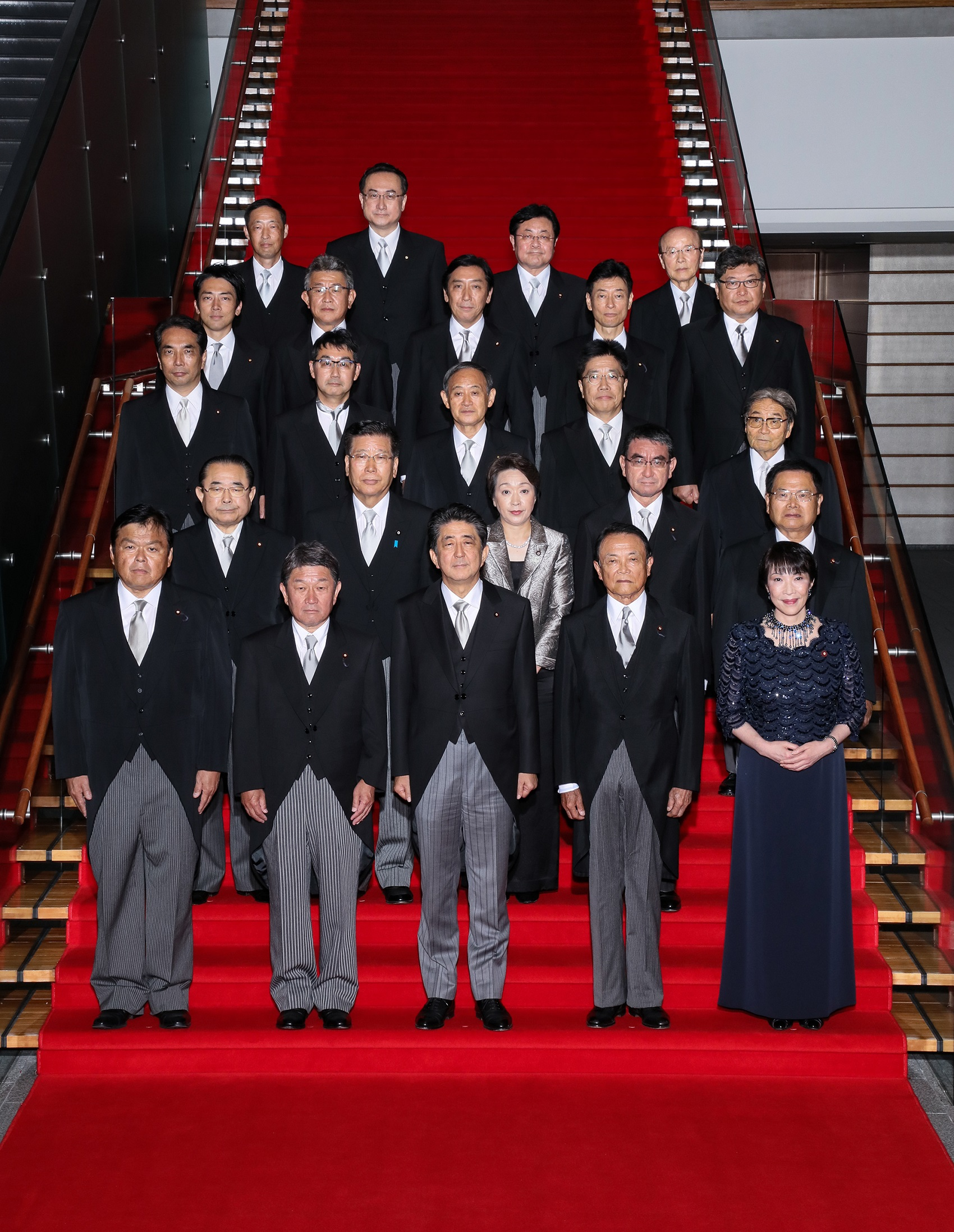 第4次安倍第2次改造内閣